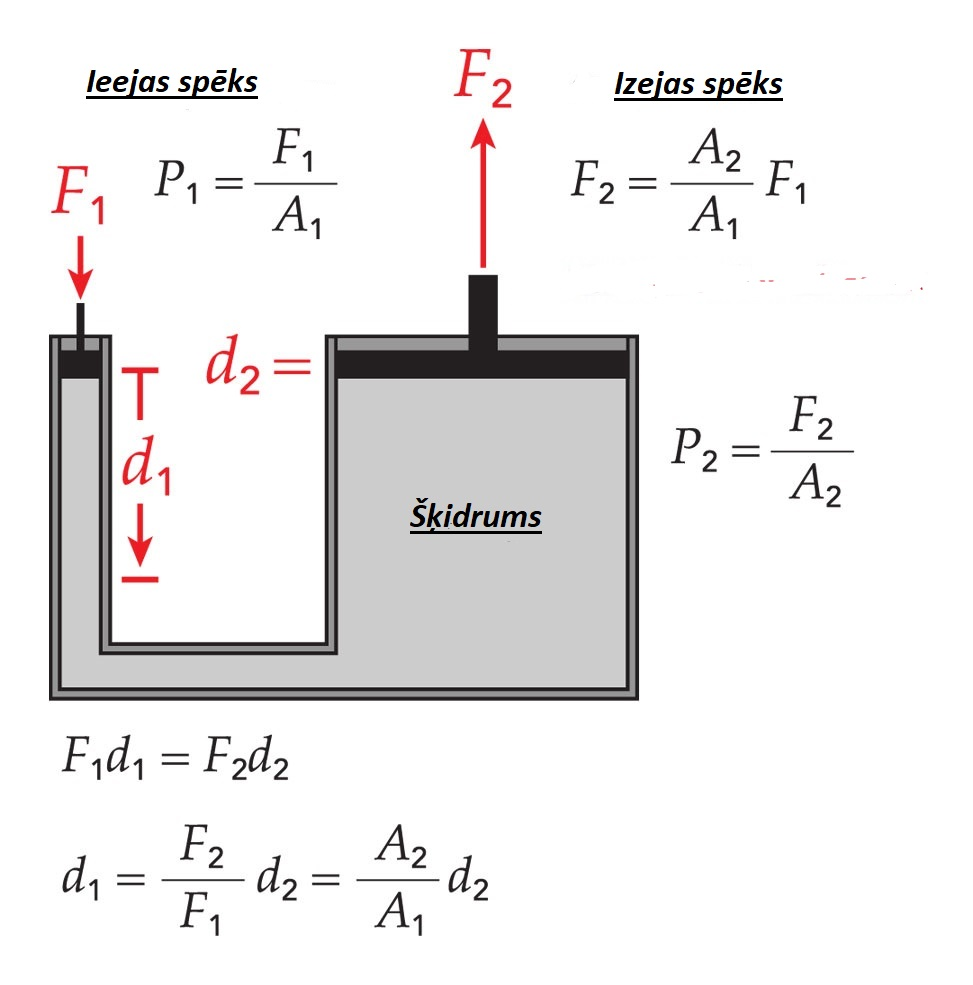 Paskāļā likuma apraksts